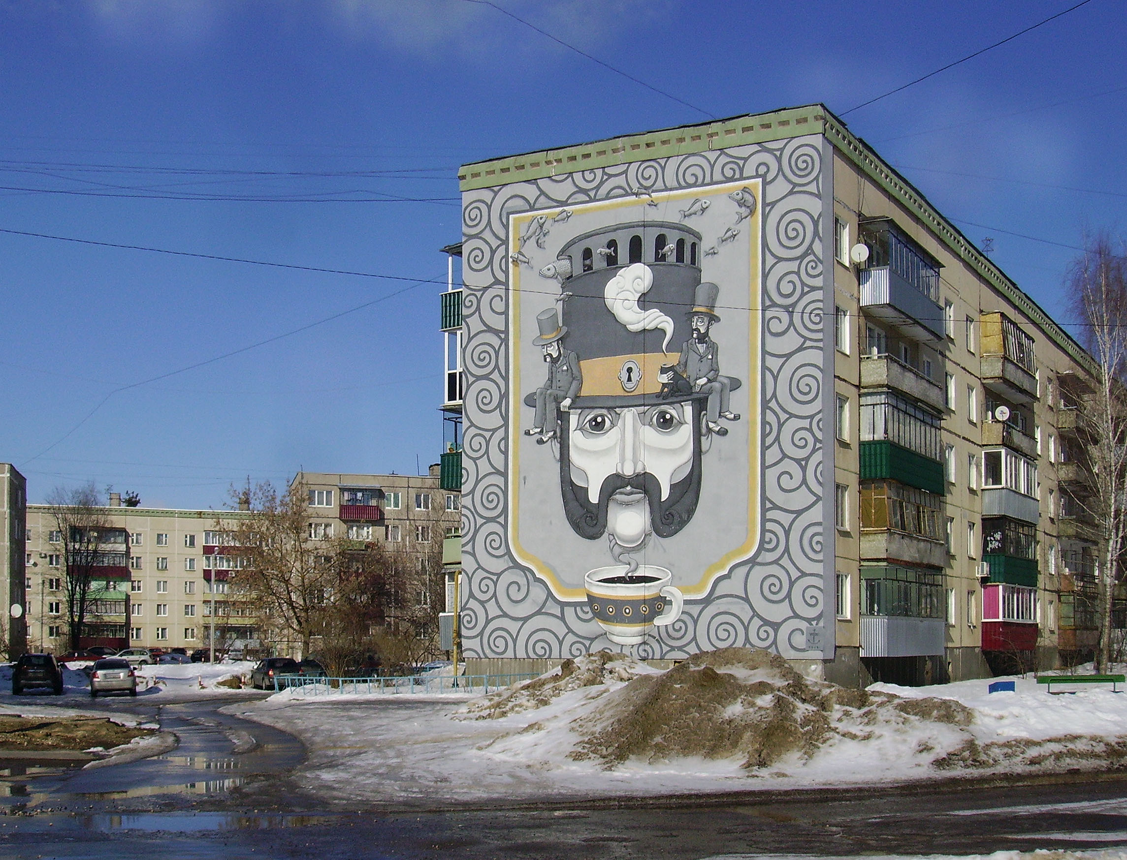 Выкса. Мурал на доме в микрорайоне Жуковский